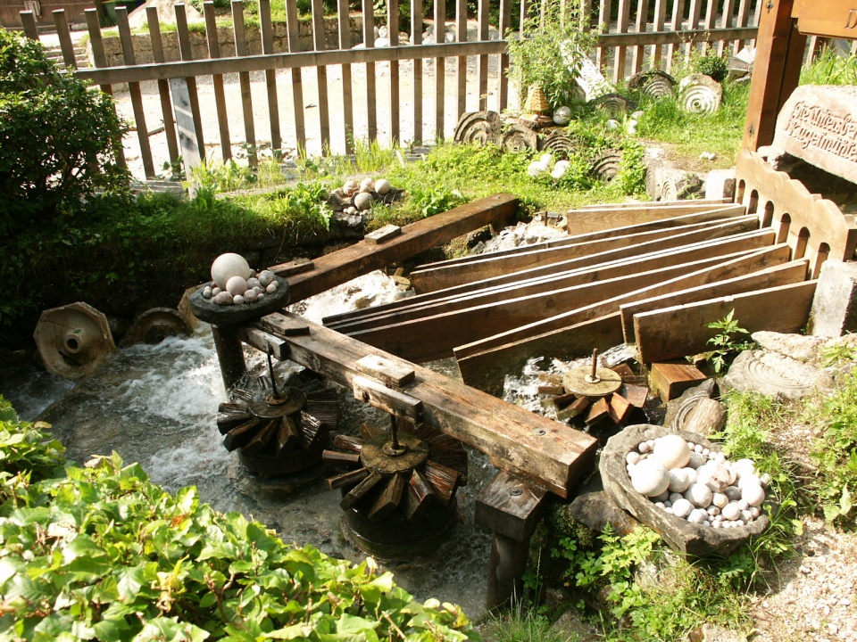 Kugelmühle bei Schellenberg